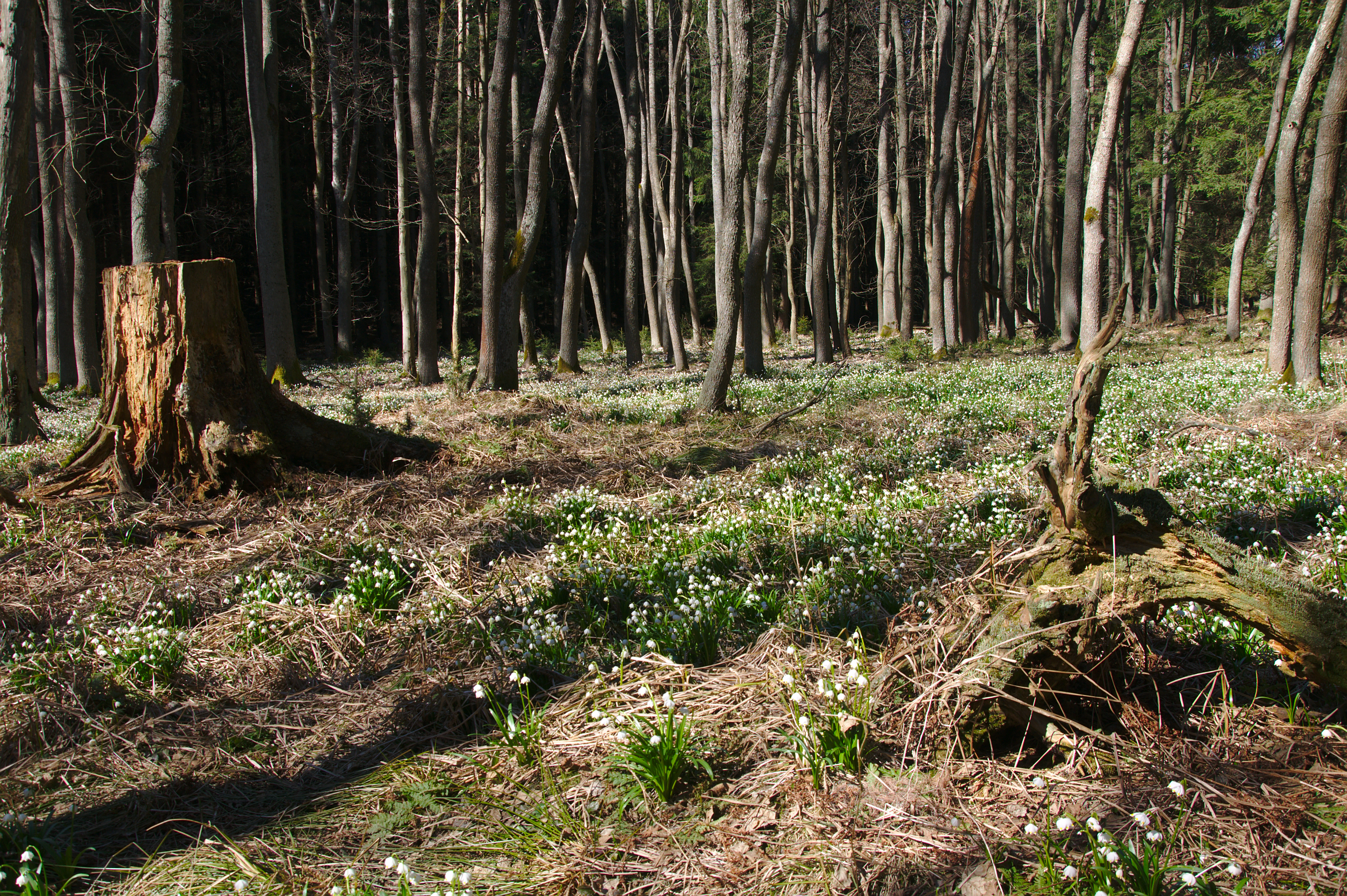 Přírodní památka Hersica, okres Blansko